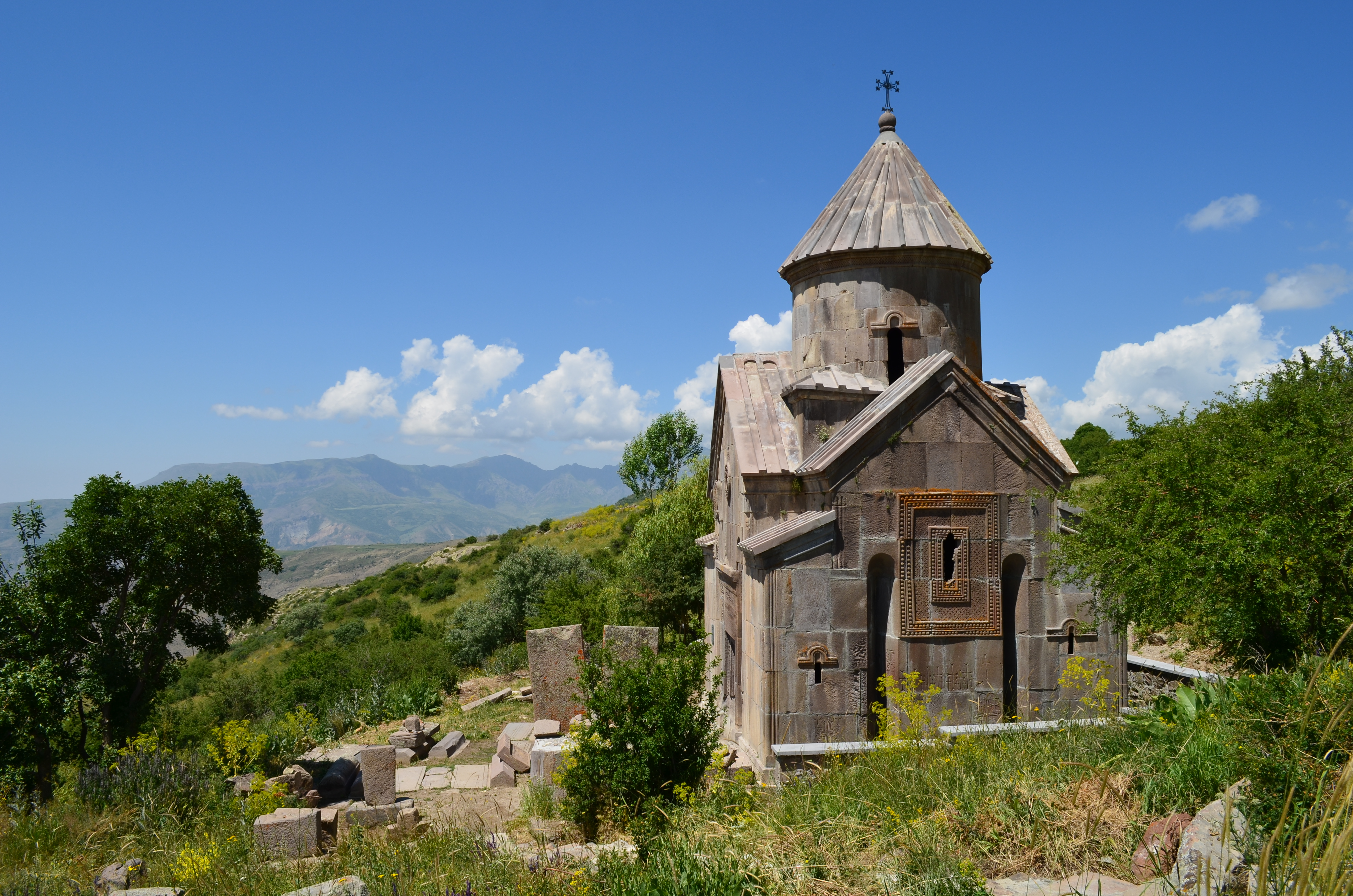 Ցաղաց Քարի վանական համալիրը 10/9